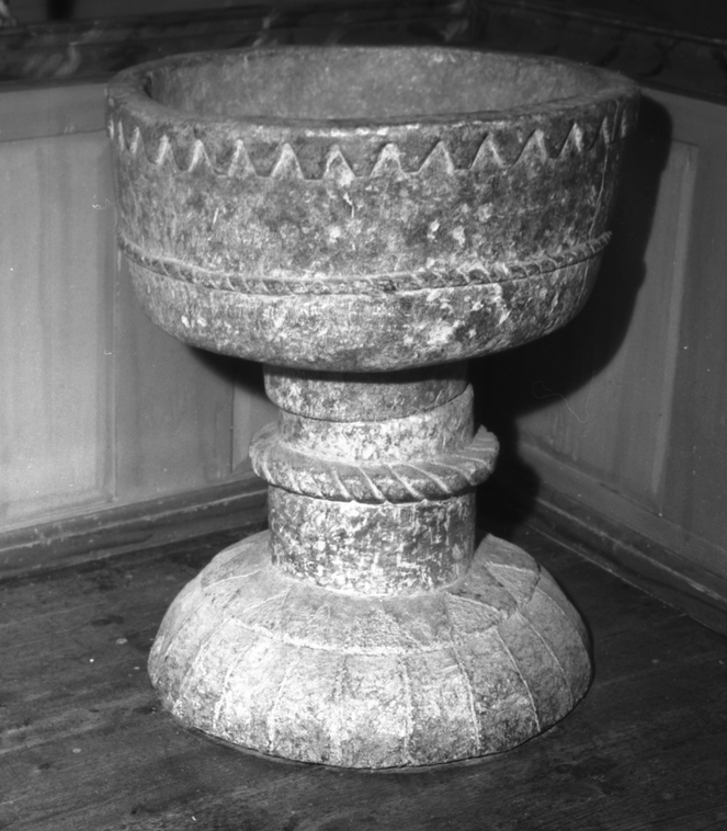 Skålleruds kyrka. Dopfunt.